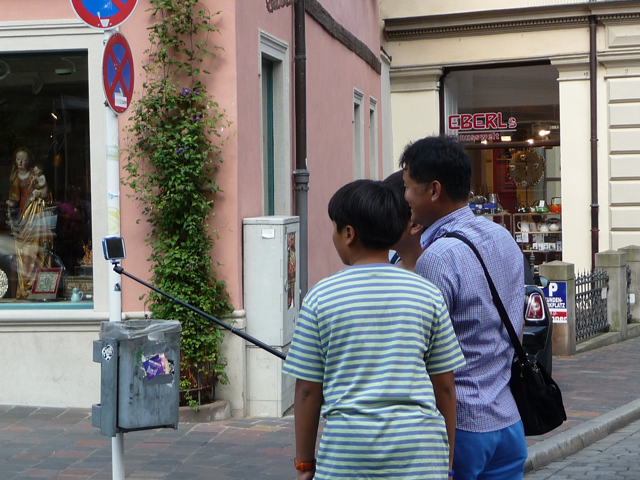 Selfie mit Teleskopstange